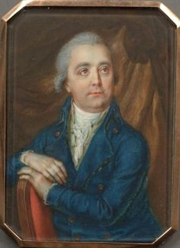 Михаил Алексеевич Пушкин (1743-1793)